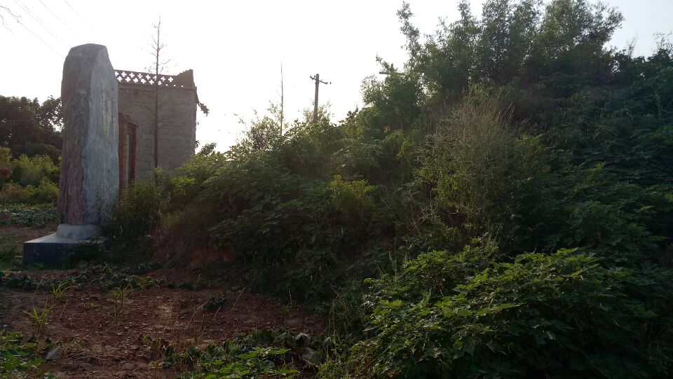 位于山东省旧县乡境内的西楚霸王墓